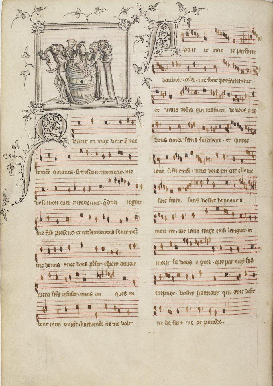 Paris, Bibliothèque Nationale, Fonds Français 1584